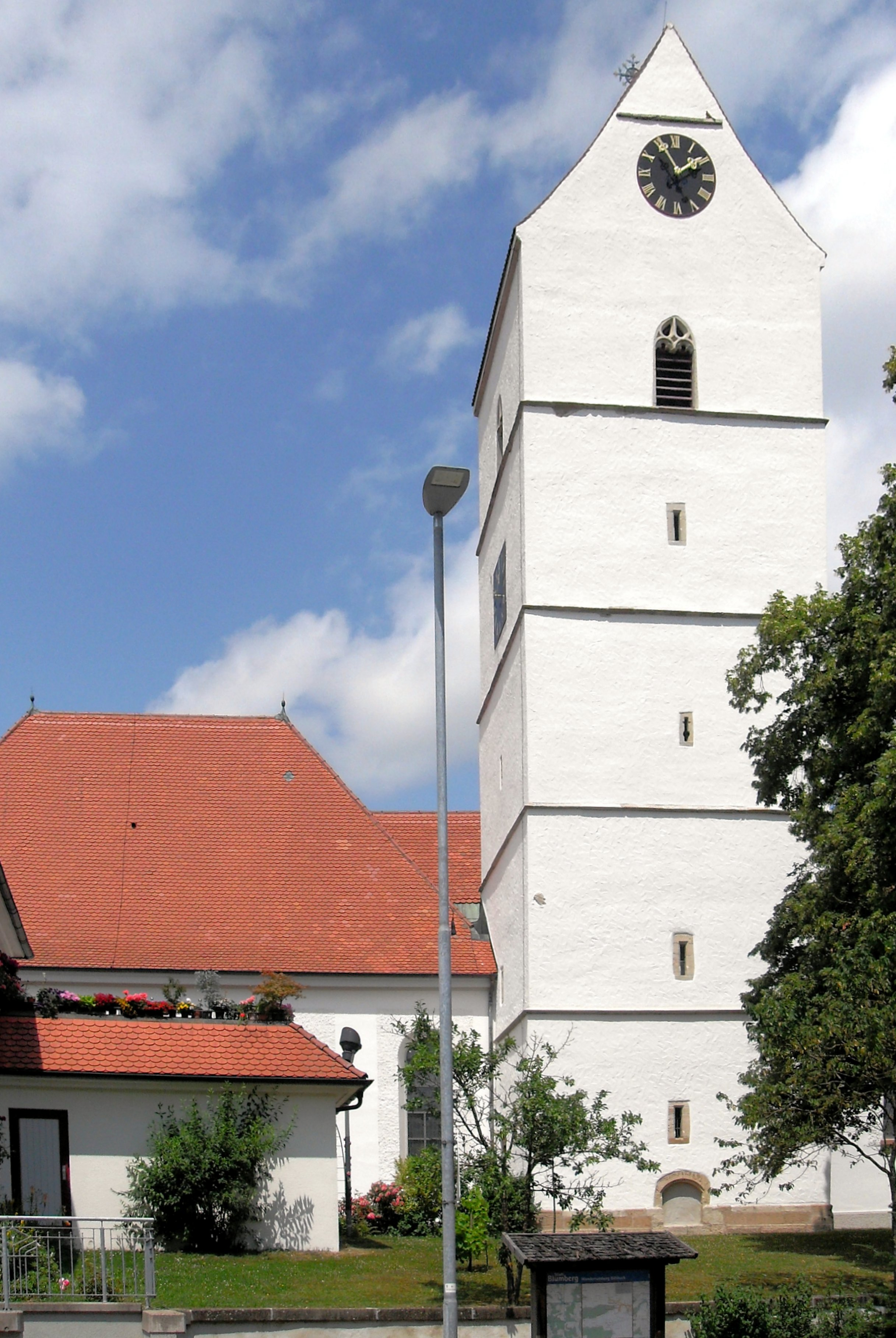 katholische Kirche St. Genesius in Riedböhringen, Stadt Blumberg, Deutschland